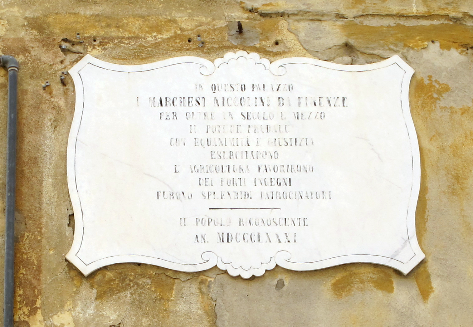 Ponsacco